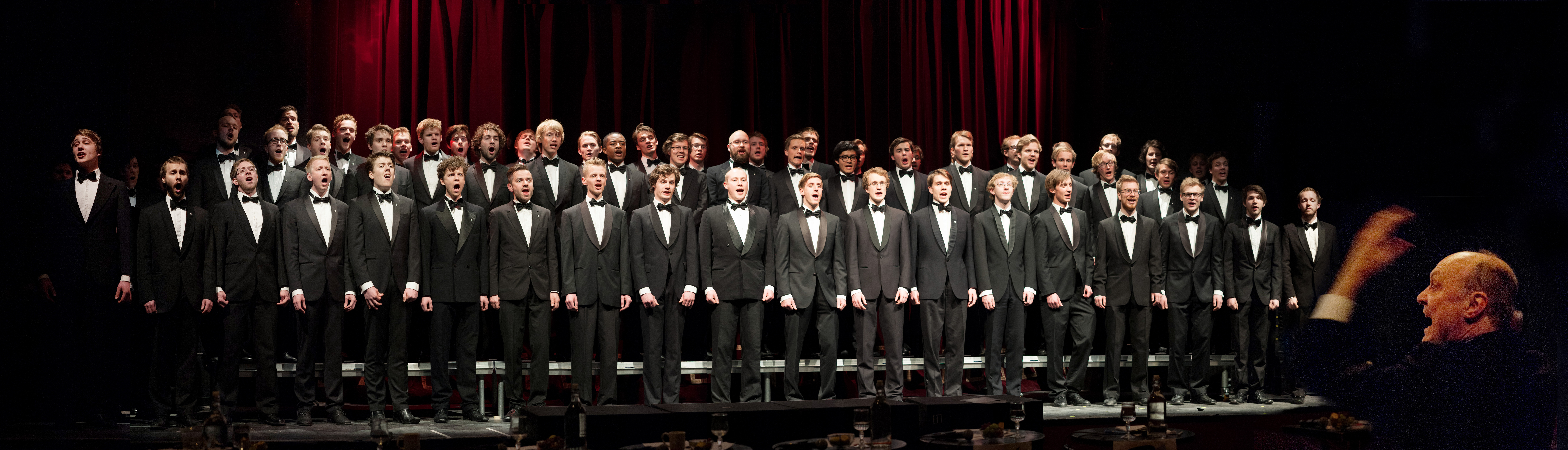 Trondhjems Studentersangforening, TSS under kunstnerisk ved samfundsmøte 2013-04-29